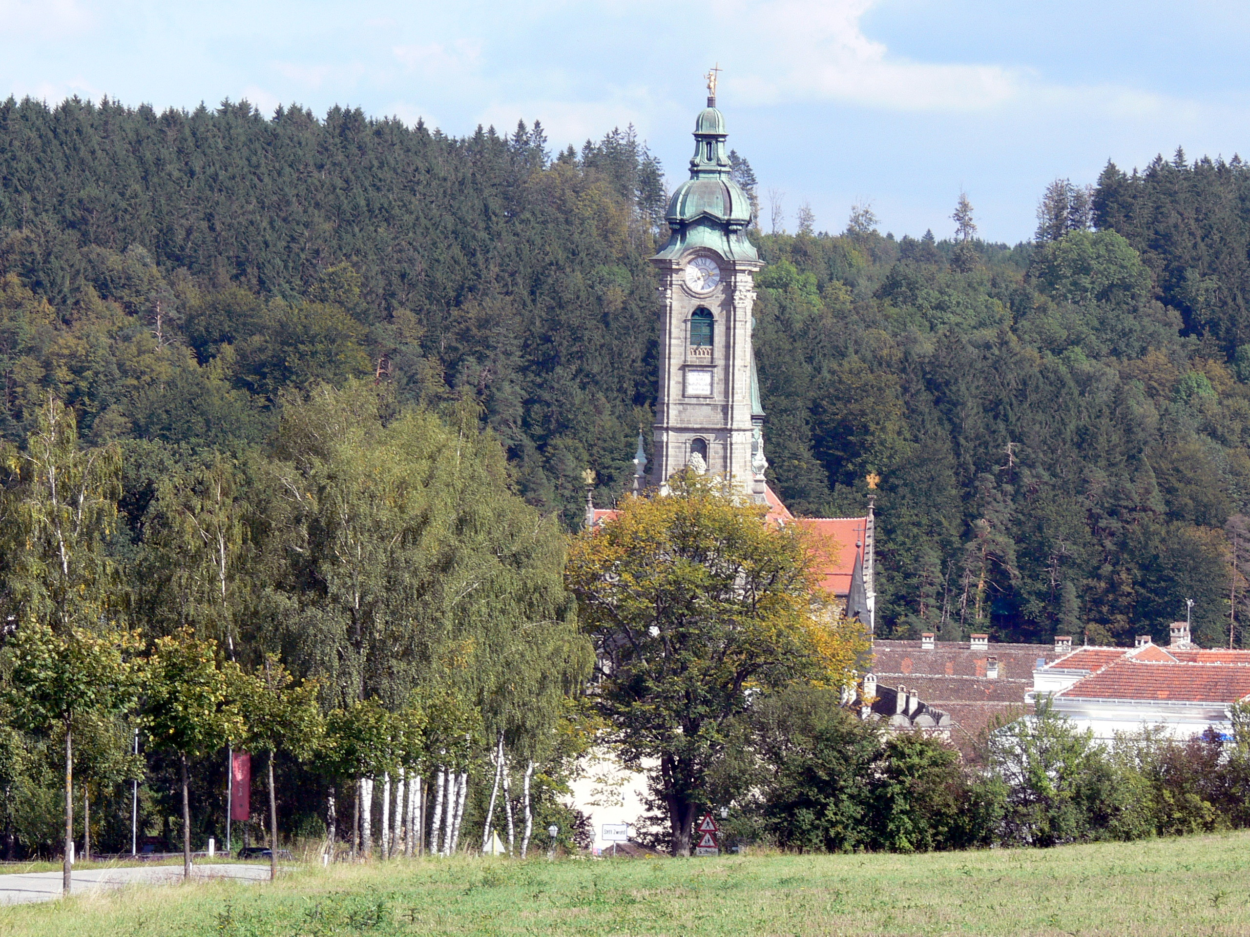 Zwettl Abbey.